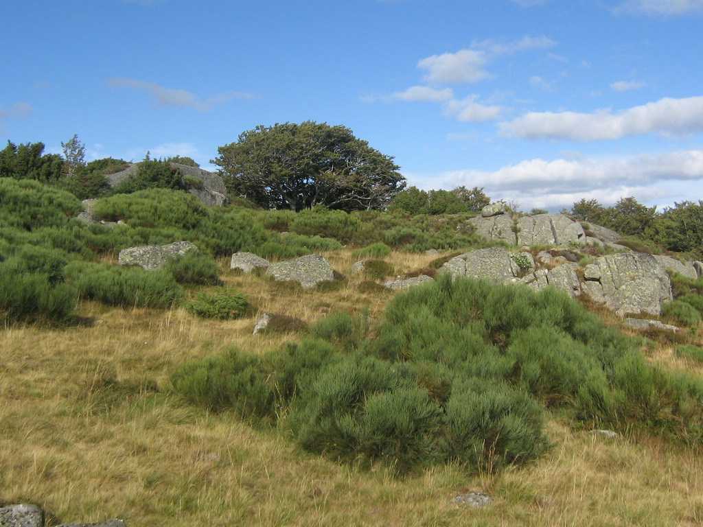 Landes à genêt dans le sud de l'Aubrac (altitude: 1250 m). Massif central, France.